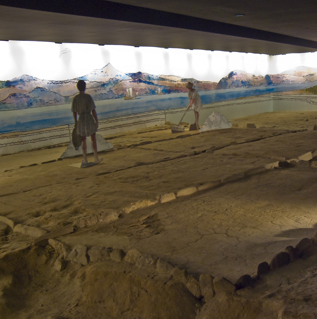 Salinas do Areal - Vigo